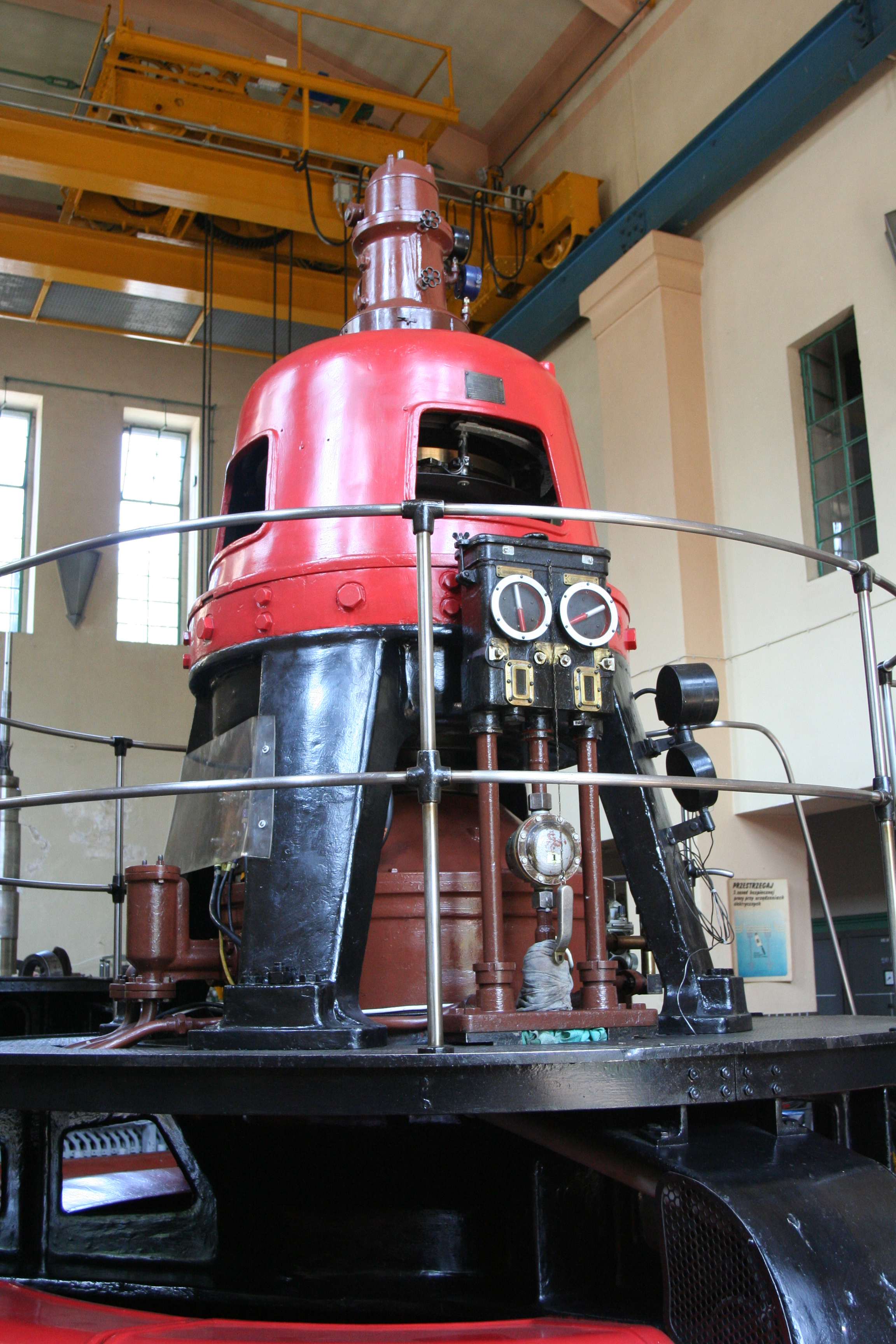 J.M.Voith turbine in Wrzeszczyn power plant on Wrzeszczyn Lake on Bóbr river near Wrzeszczyn, Lower Silesia, Poland.